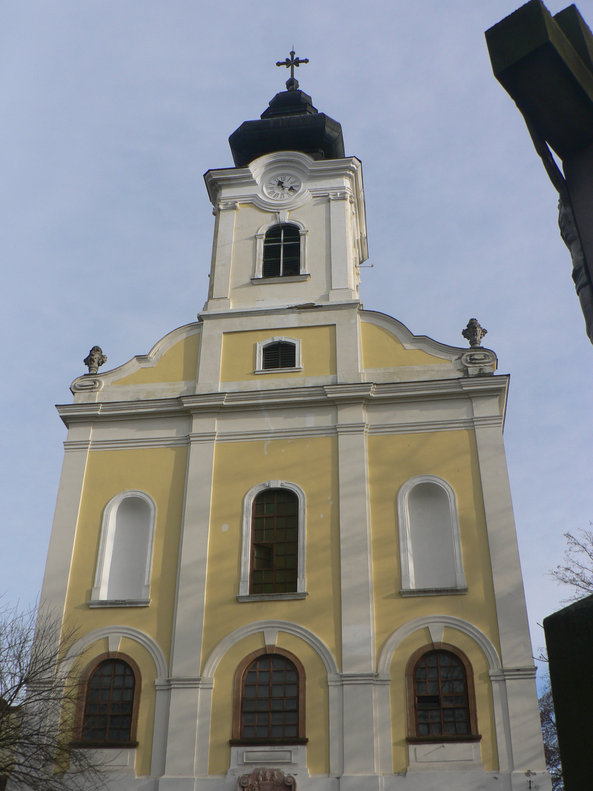 A máriabesnyői Nagyboldogasszony Bazilika (Gödöllő, Pest megye, Magyarország)